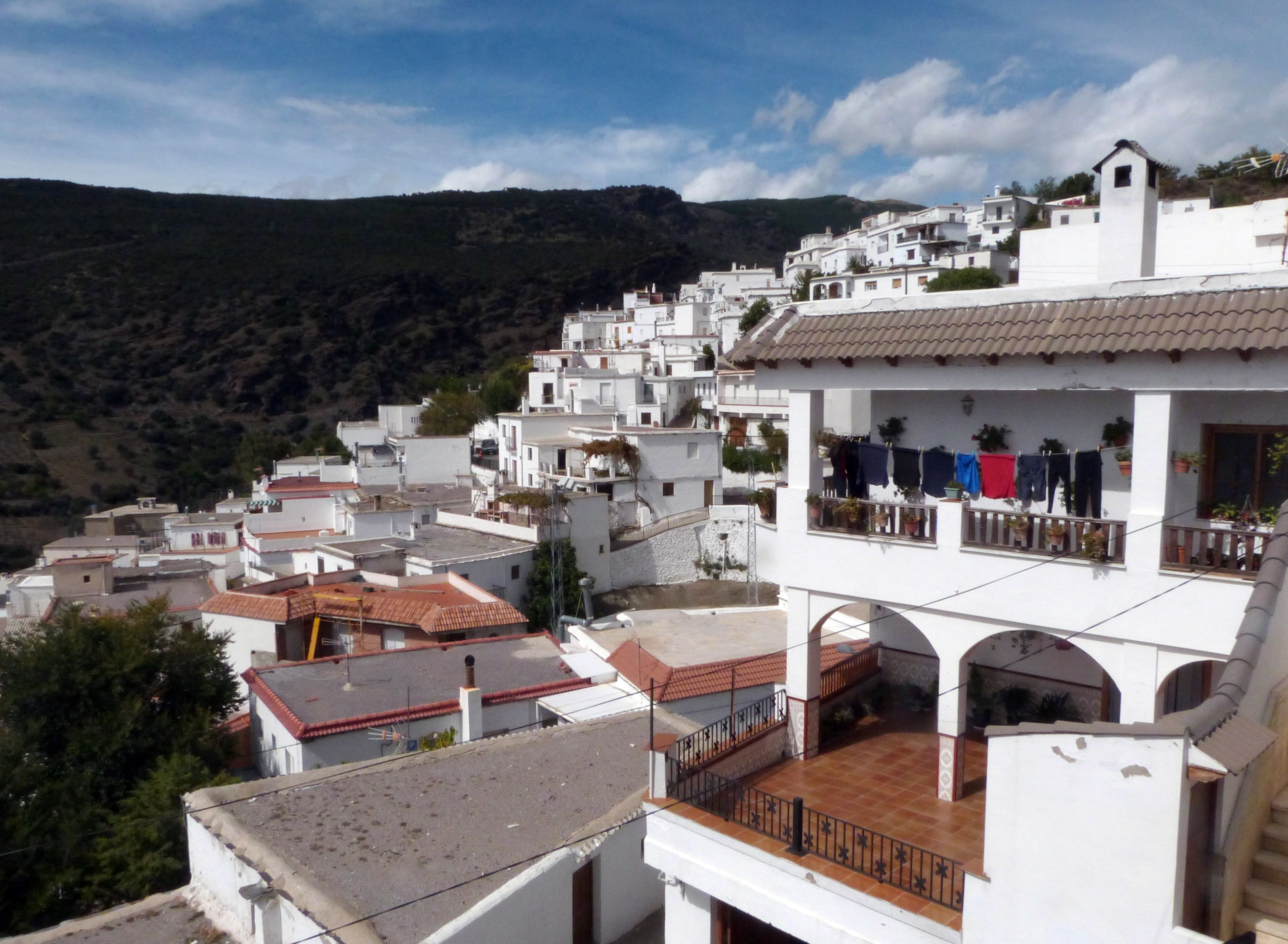 Bayarcal